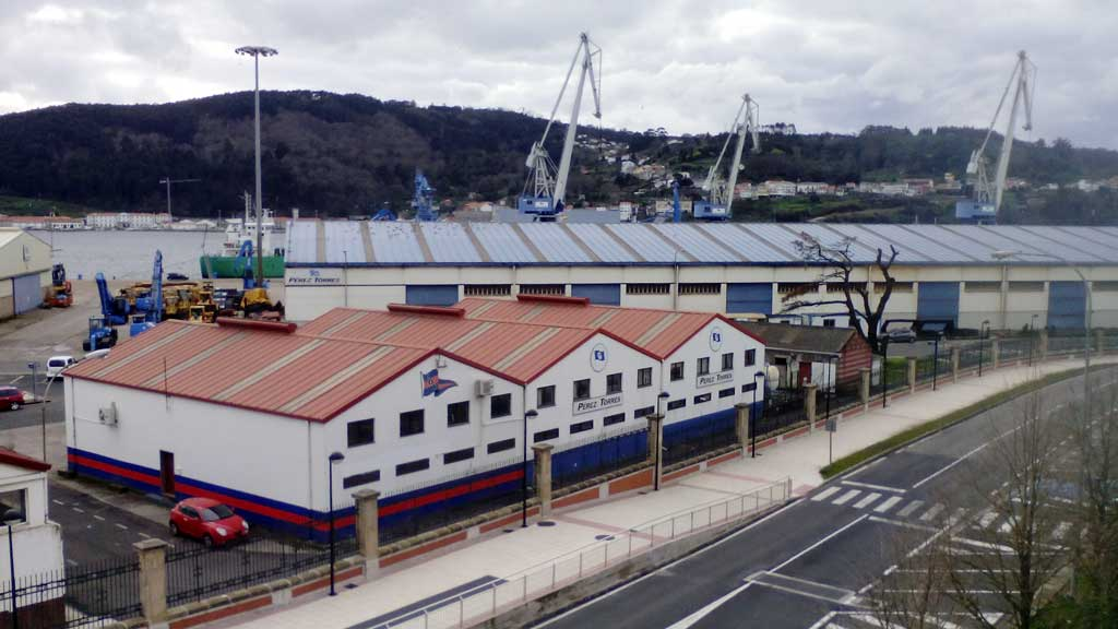 Instalacións de Pérez Torres no porto de Ferrol.